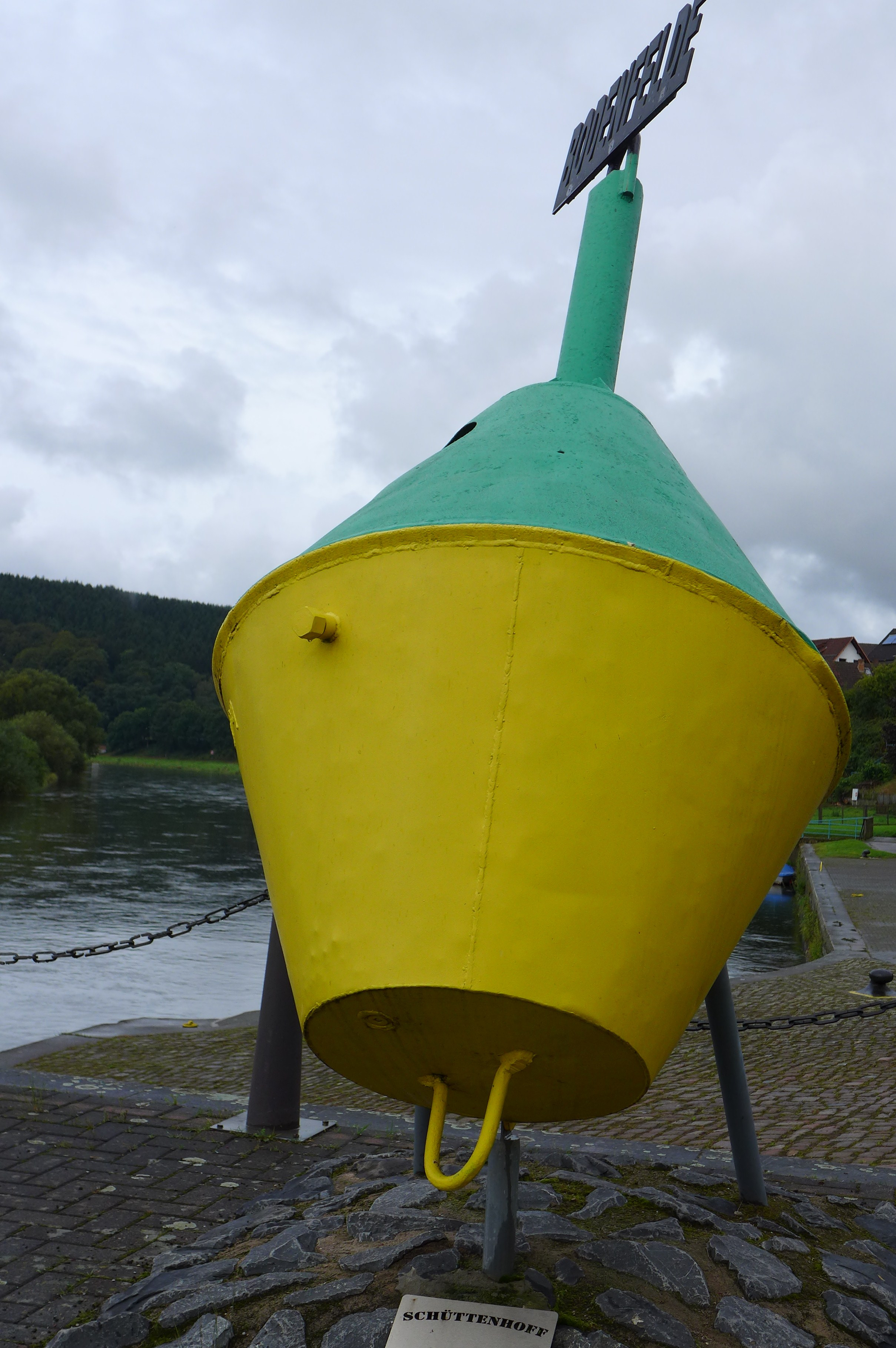 Denkmal für Marine für Schüttenhoff in Bodenfelde